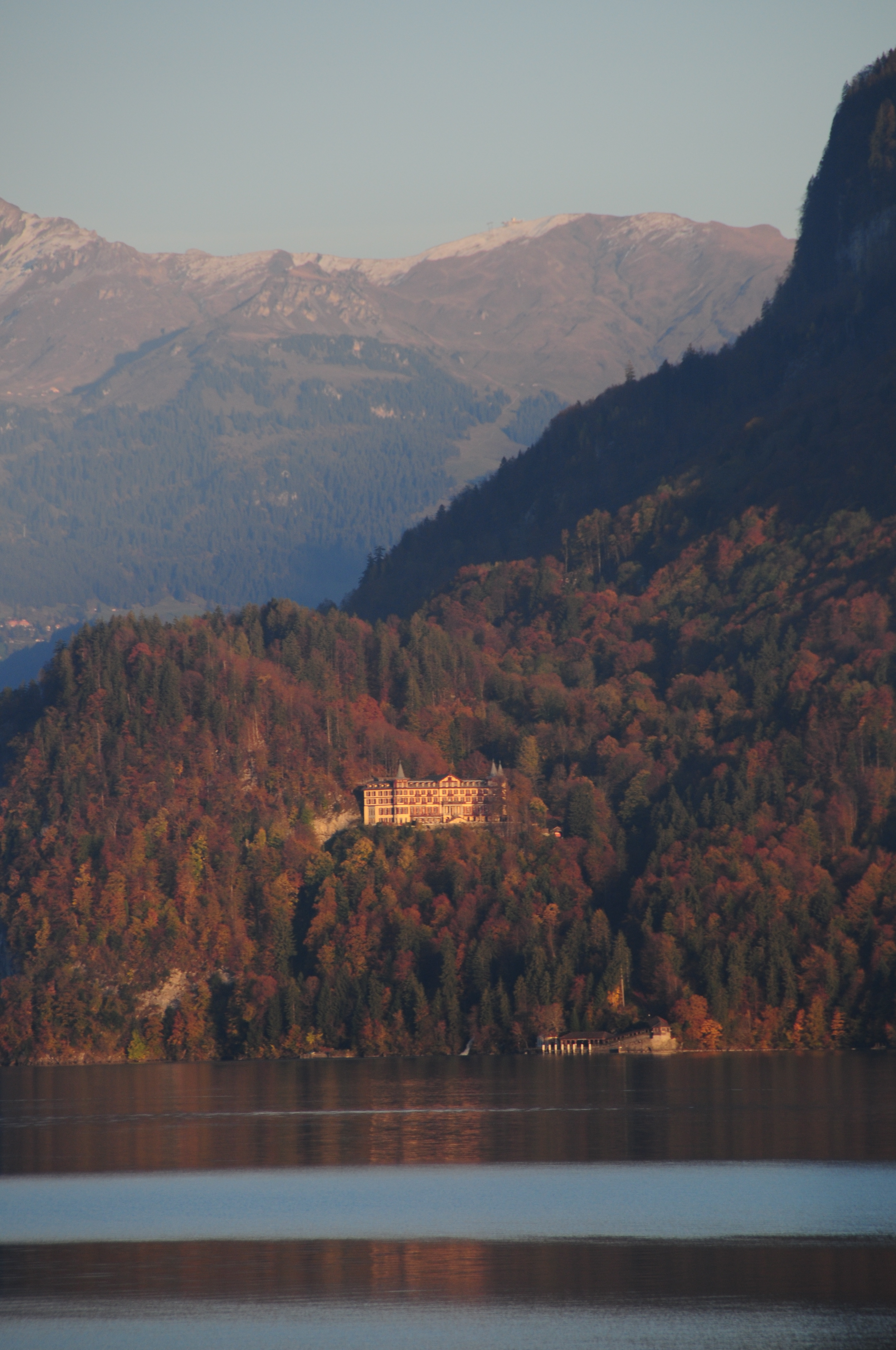 Hotel Giessbachfälle